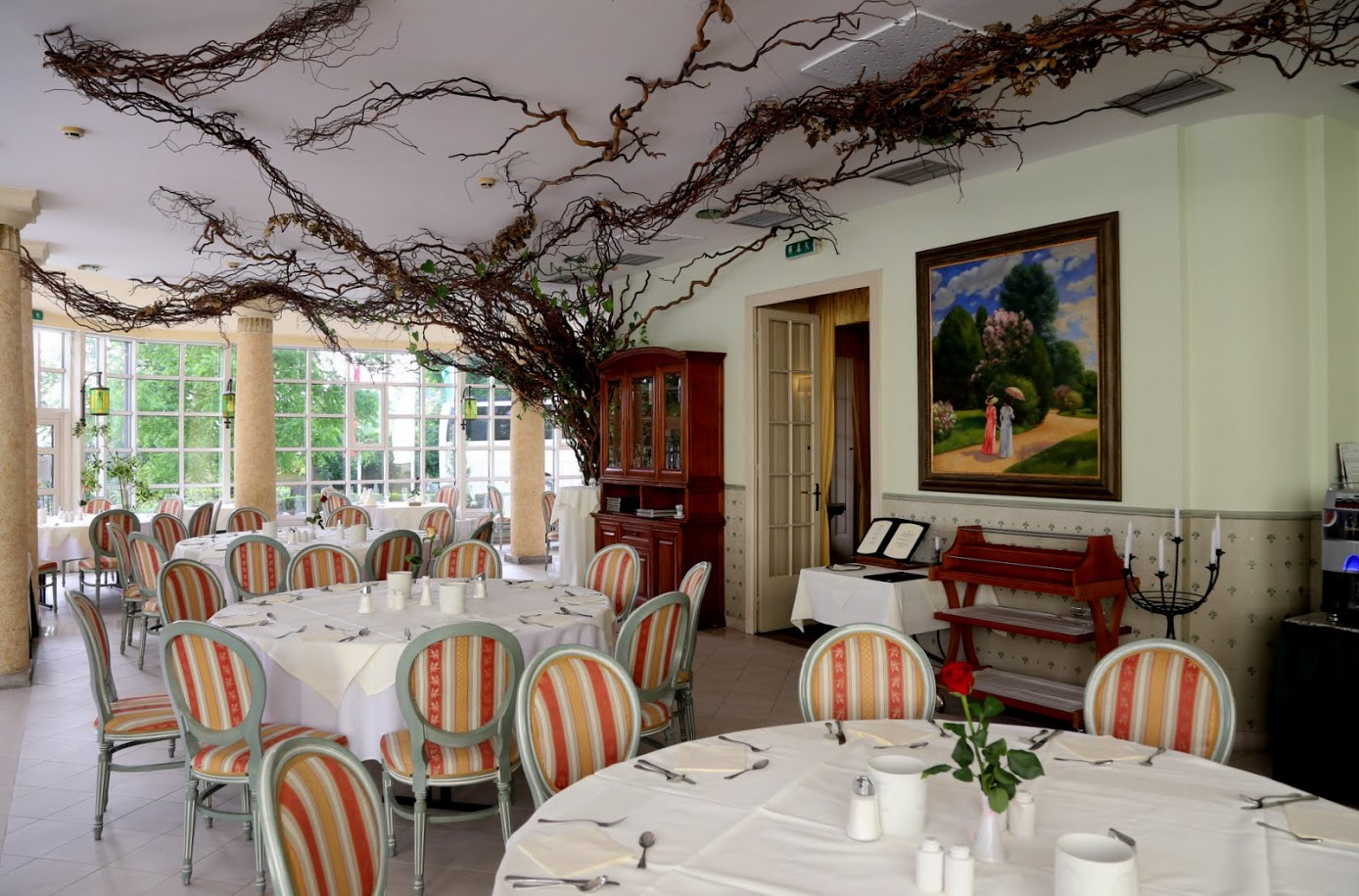 Szidónia Kastélyszálló, Röjtökmuzsaj